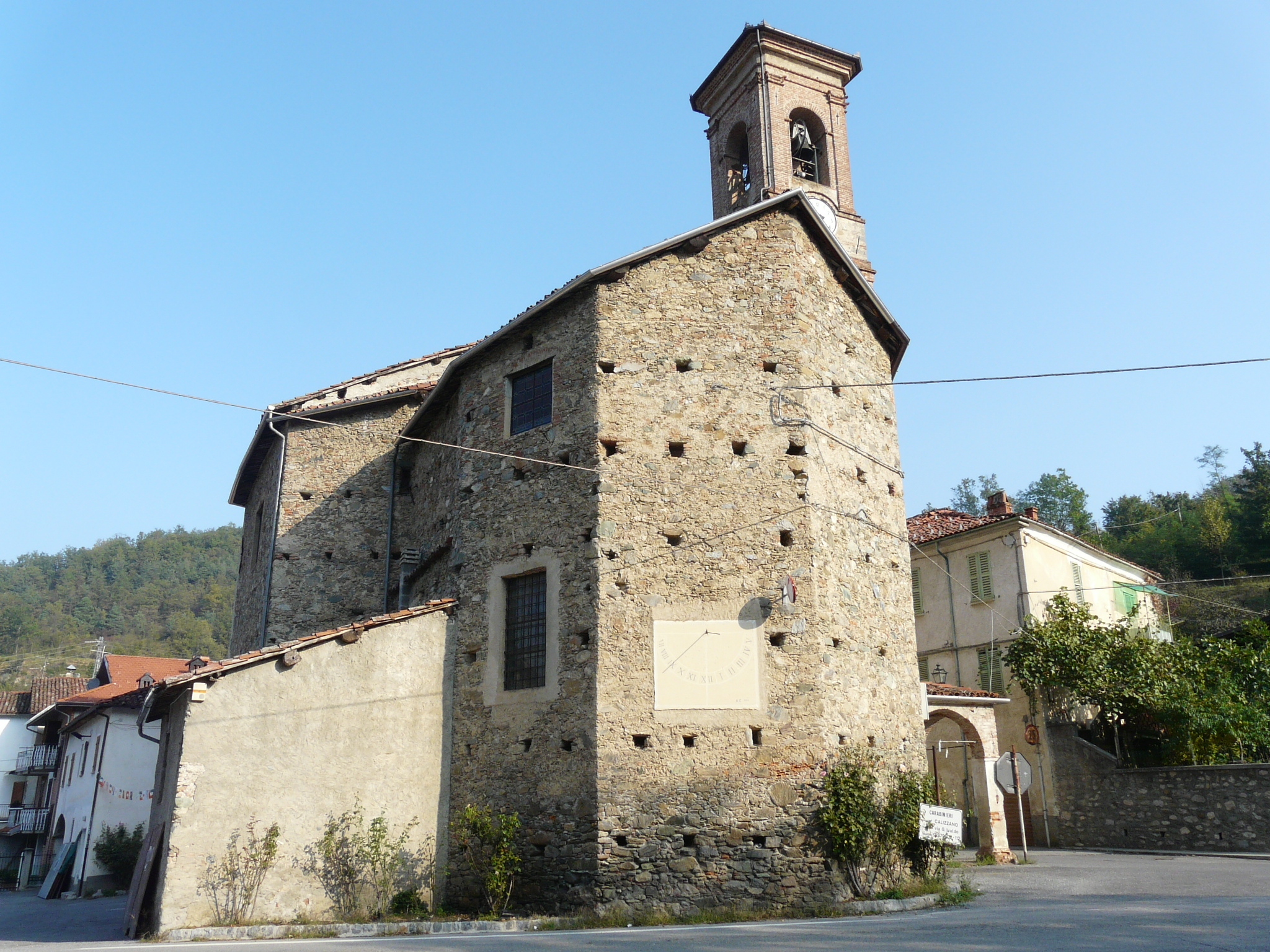 Chiesa di San Donato, Massimino, Liguria, Italia